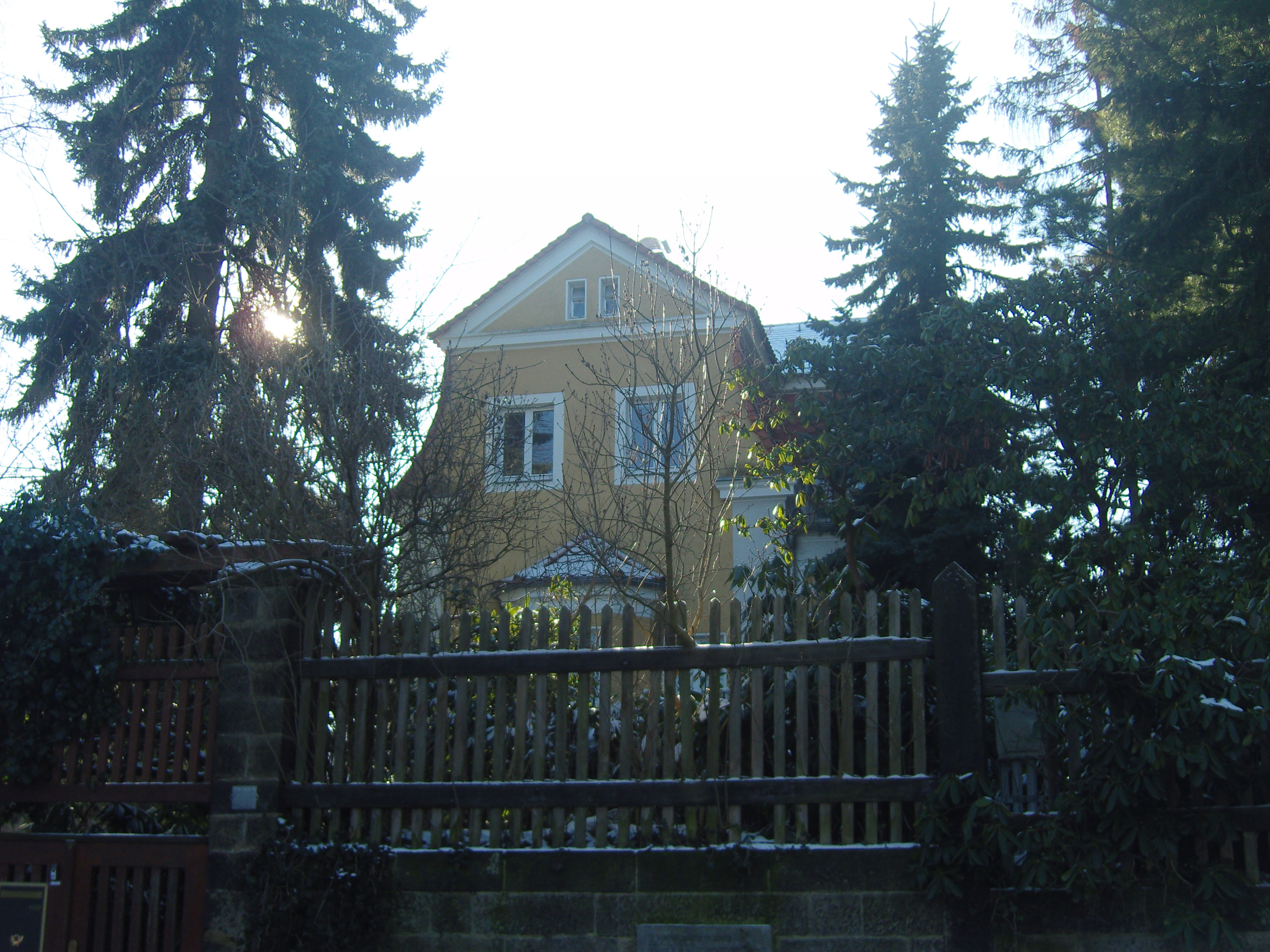 Wohnhaus von Rudolf Mauersberger in der Sierksstraße in Dresden, Oberloschwitz